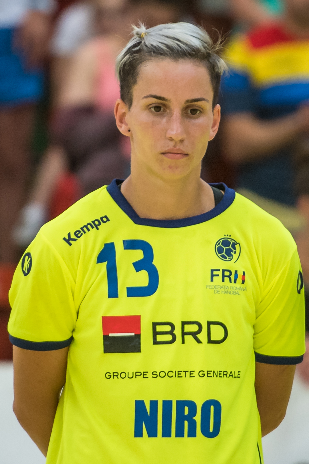 Damenhandball WM-Qualifikation Playoff Österreich vs Rumänien am 13. Juni 2017 in Stockerau. Bild zeigt Cristina Laslo (ROU).